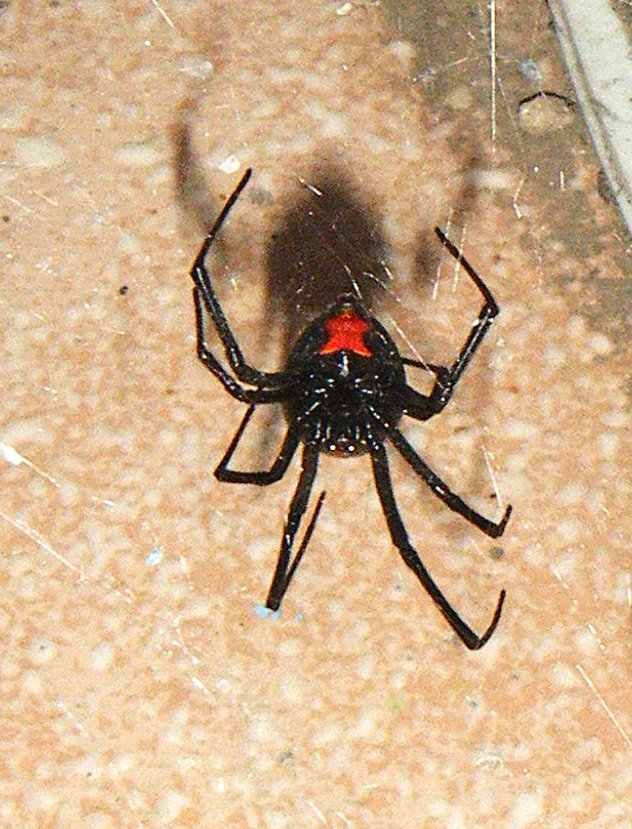 Viuda negra hembra.